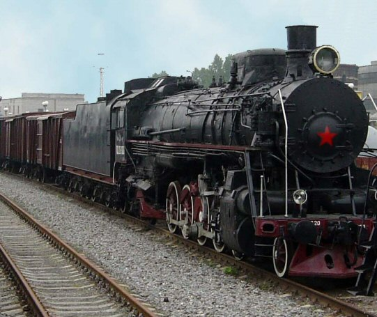 Russische stoomlocomotief, Treinmuseum Sint Petersburg. Eigen foto Mark Voorendt, augustus 2002 categorie:Afbeelding trein